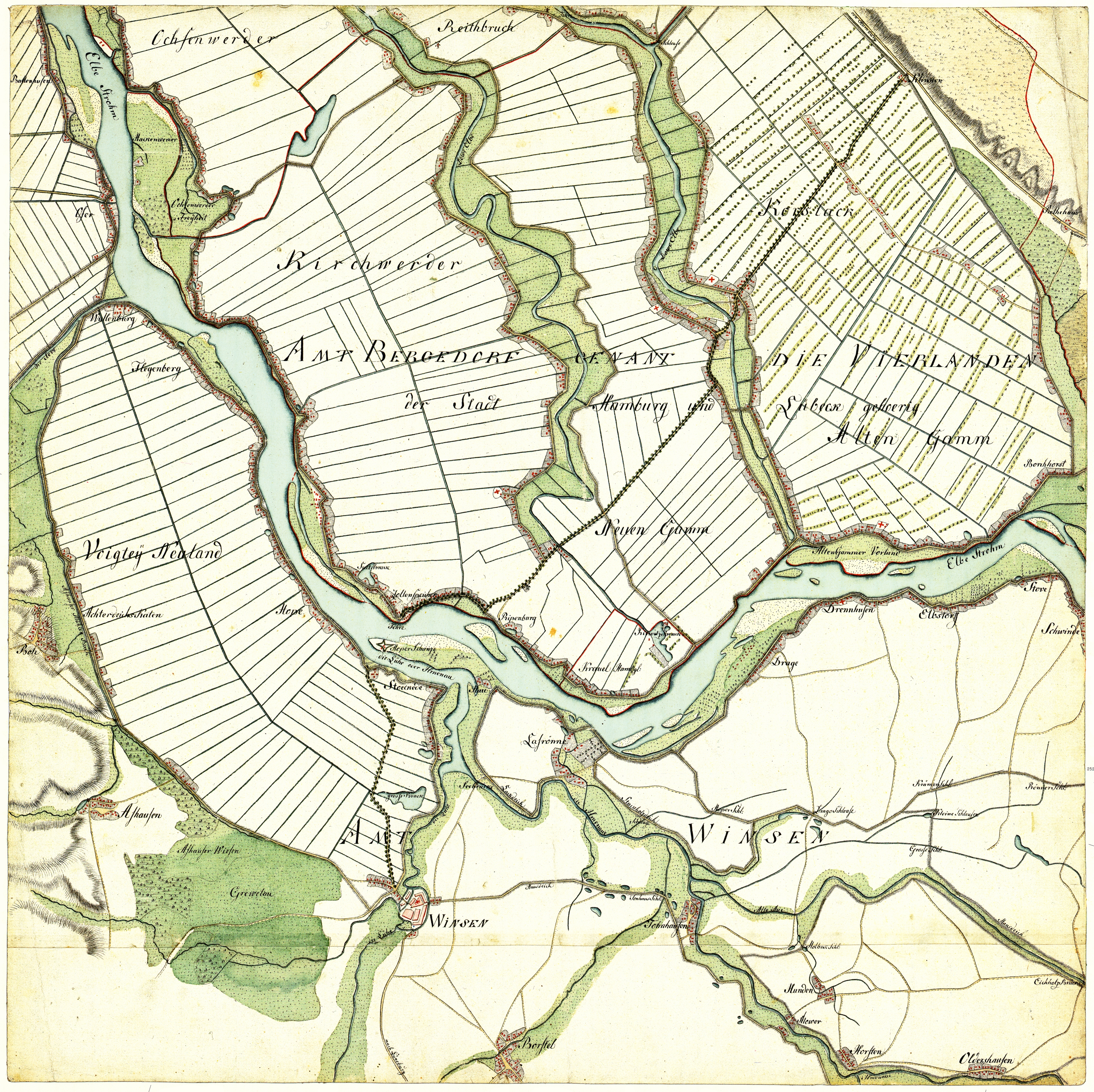 Vierlande, Winsen. Aufgenommen in den Jahren 1789 bis 1796 unter der Direktion des Majors Gustav Adolf von Varendorf durch Offiziere des Schleswigschen Infanterieregiments